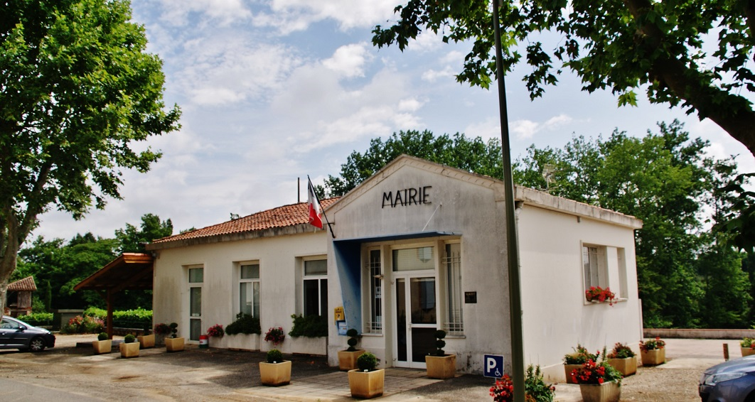 La Mairie